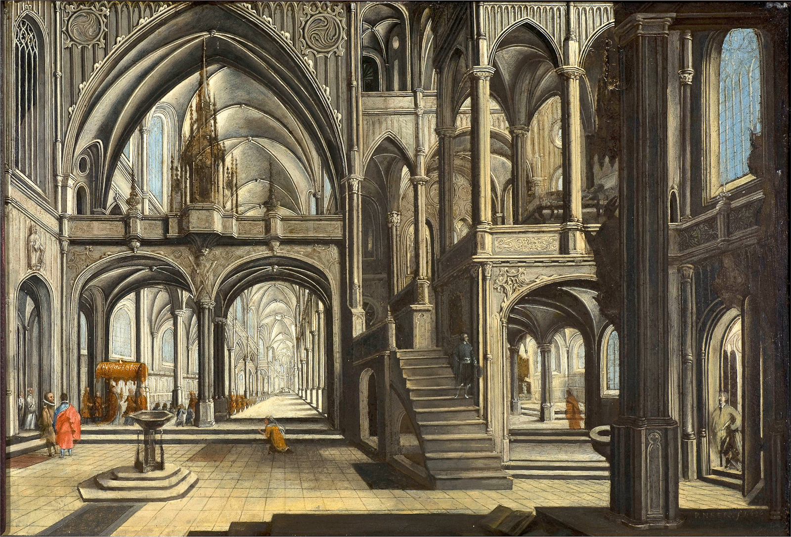 tableau inspiré de la gravure selon Aerts